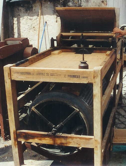 trieur de semences de céréales